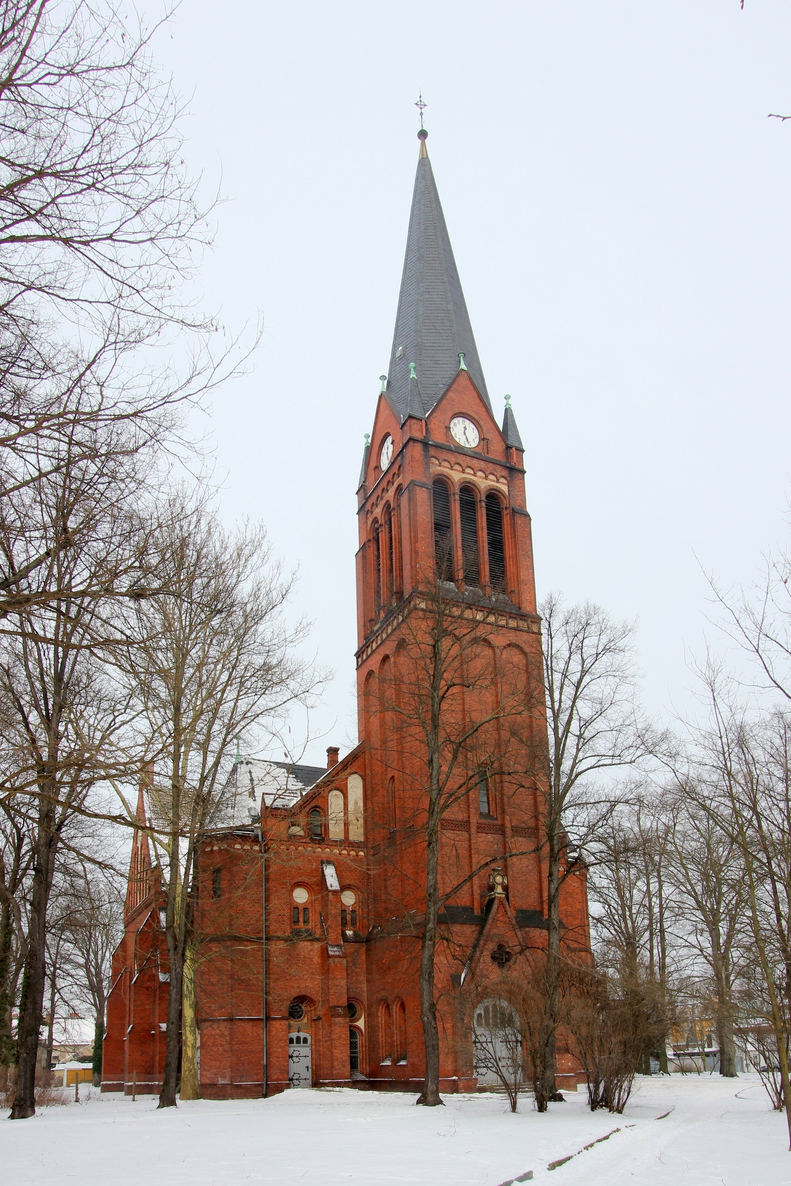 Luckenwalde in Brandenburg: Die Jakobikirche. Das Gebäude ist ein eingetragenes Baudenkmal.